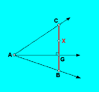 Filyon Çizgisi-Philon's Line